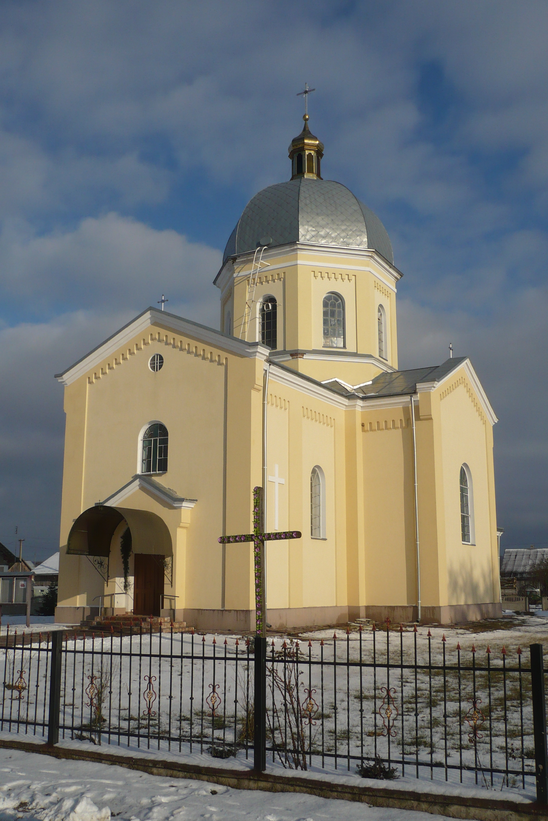 Cerkiew św. Mikołaja